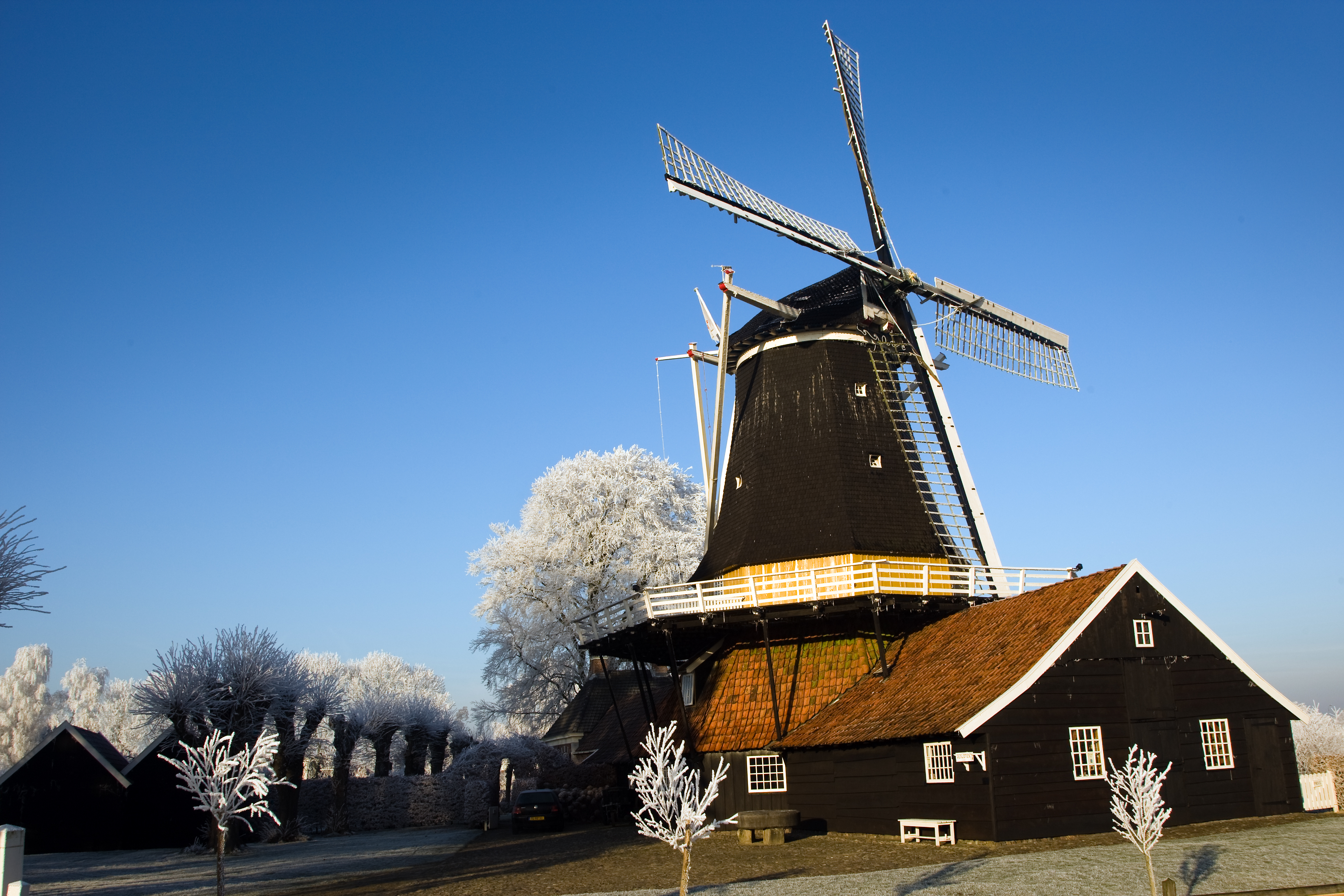 Pelmolen Rijssen in winter landscape